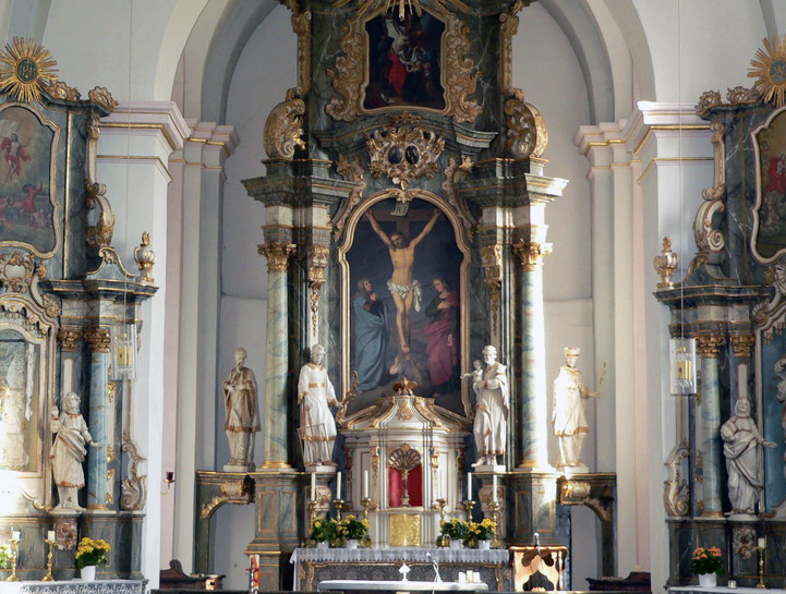 St. Laurentiuskirche in Scharfenberg